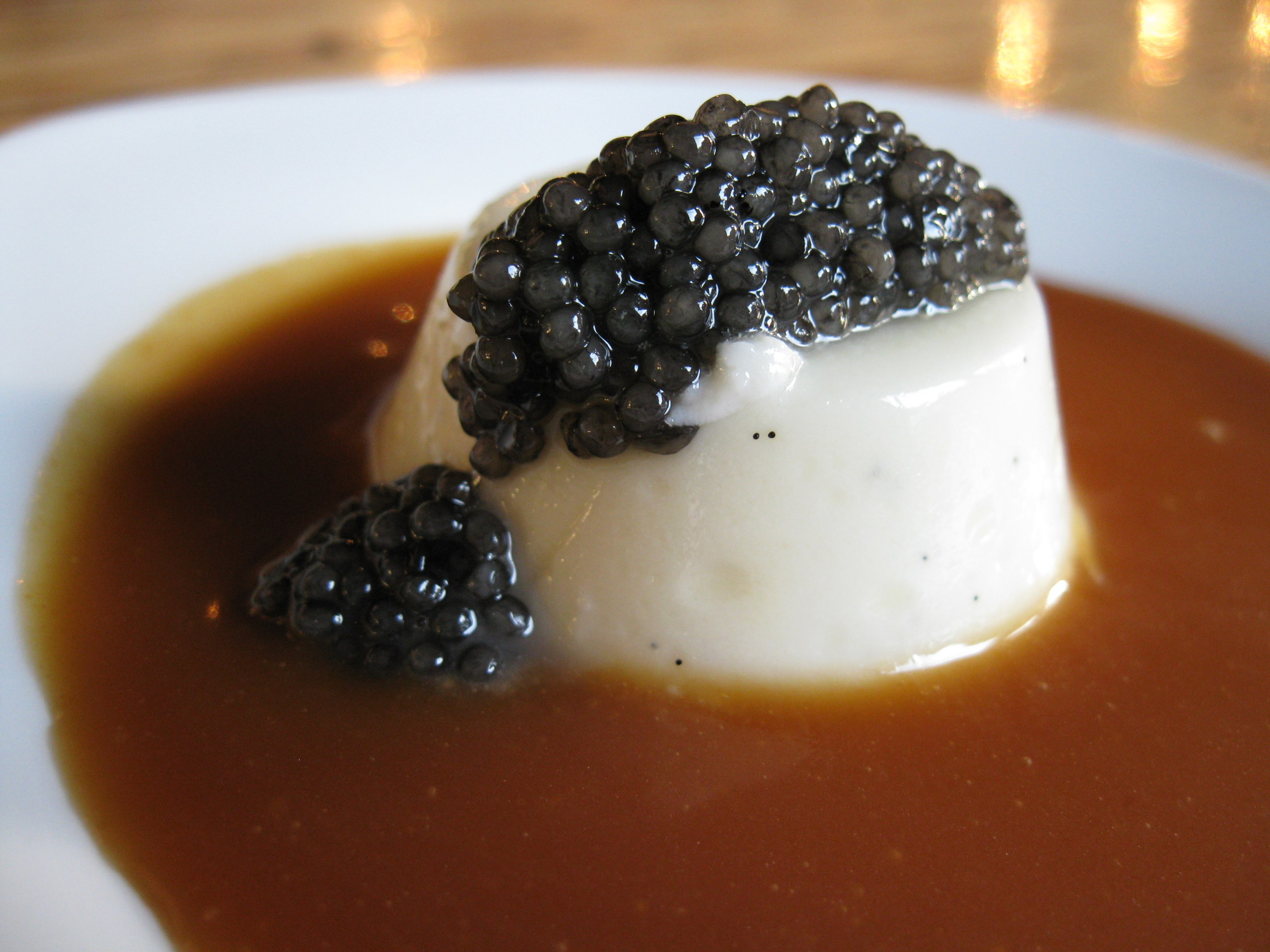 Vanilla Panna Cotta, caramel, and caviar.